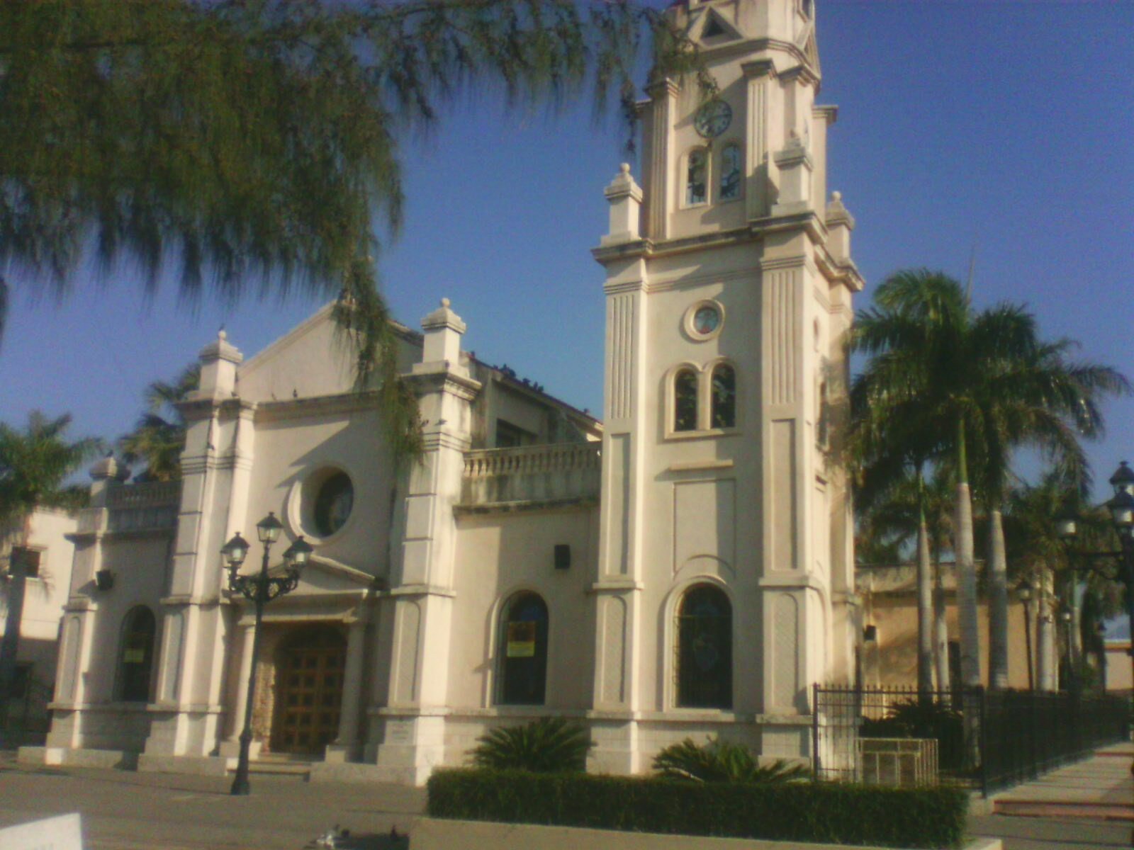 Catedral Nuestra Señora de Regla, Baní, Peravia.